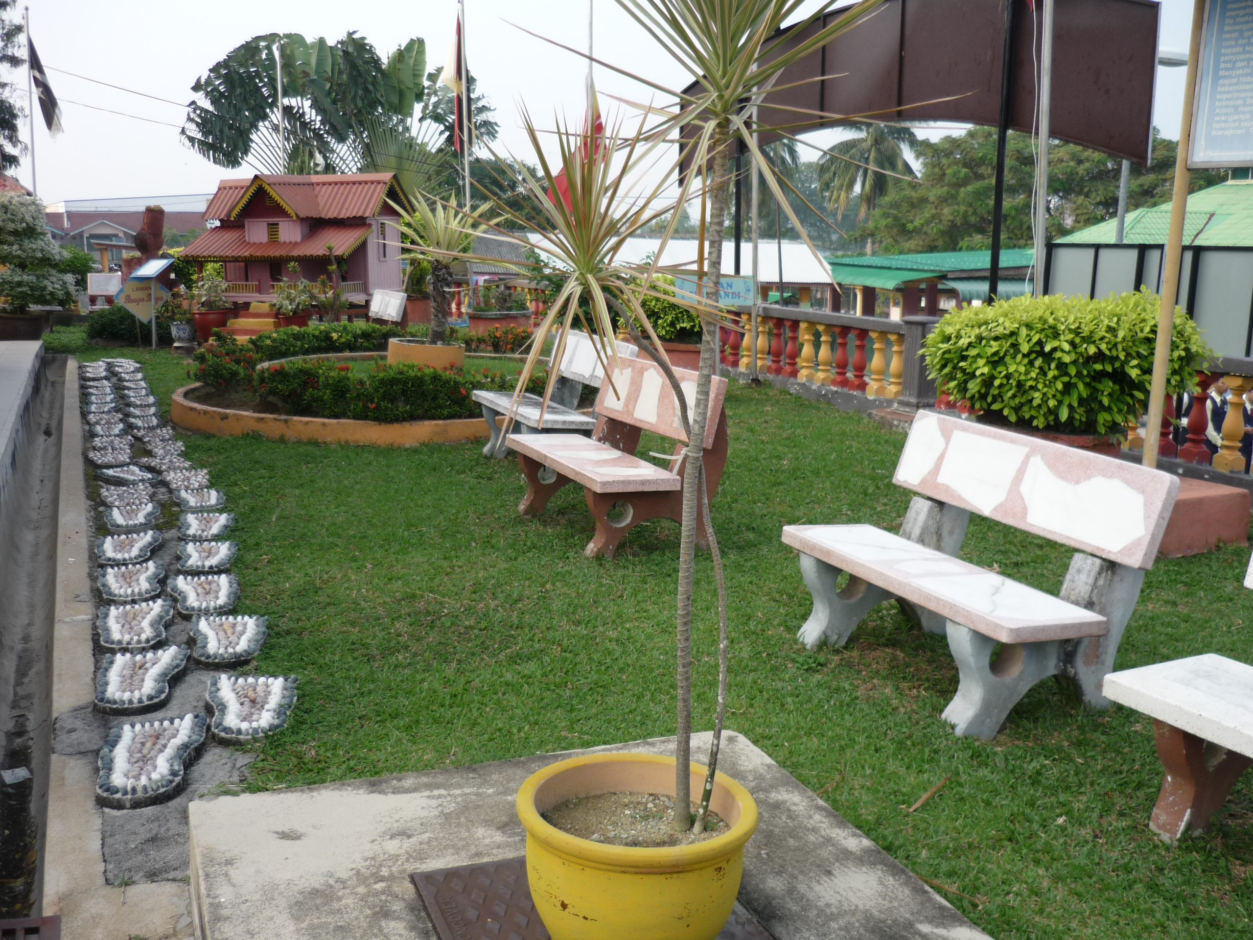 Tempat beristirahat pelajar SMKDA